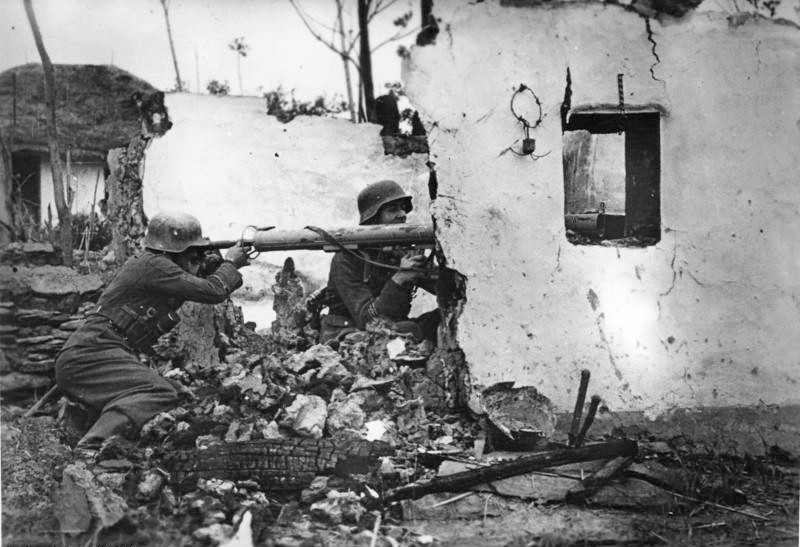 Russland, Füsiliere mit "Panzerschreck" Scherl Bilderdienst Panzerfüsiliere der Division "Grossdeutschland" sind in den Trümmern eines Hauses mit dem "Panzerschreck" , der gefürchteten Nahkampfwaffe gegen Panzer, in Stellung gegangen und erwarten hier den Angriff sowjetischer Panzer. PK-Aufnahme, Pk-Kriegsberichter Pfeiffer 1.7.44 [Herausgabedatum]